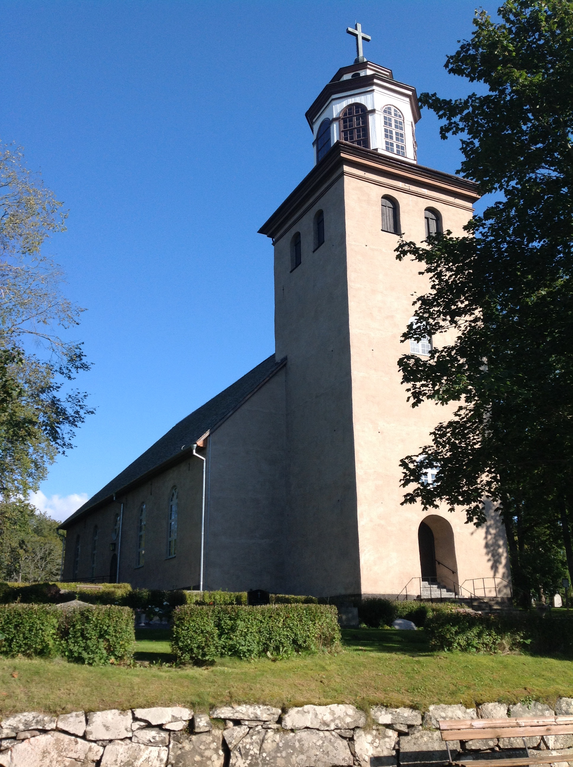 Framsidan på By Kyrka i Värmland